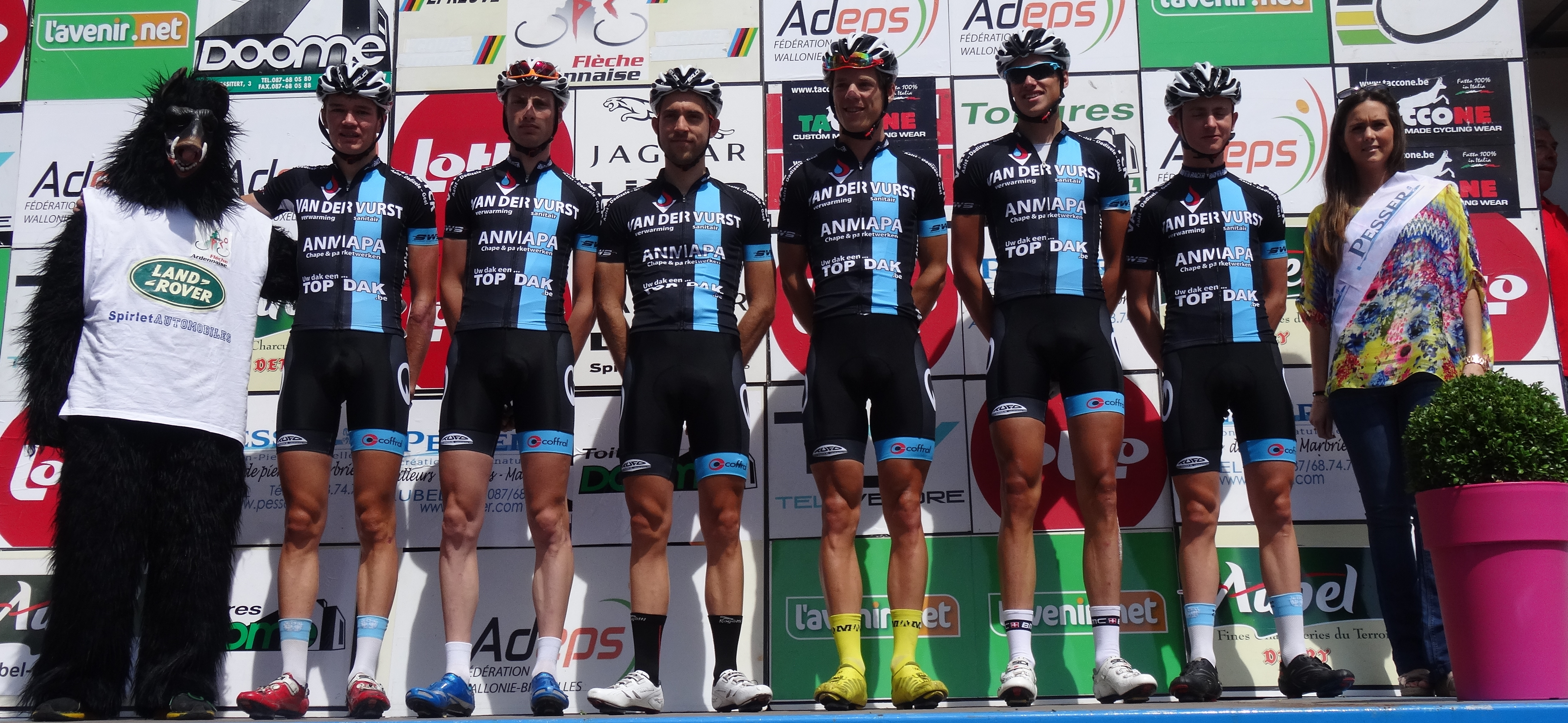 Reportage photographique réalisé le dimanche 22 juin à l'occasion du départ et de l'arrivée de la Flèche ardennaise 2014 à Herve, Belgique.